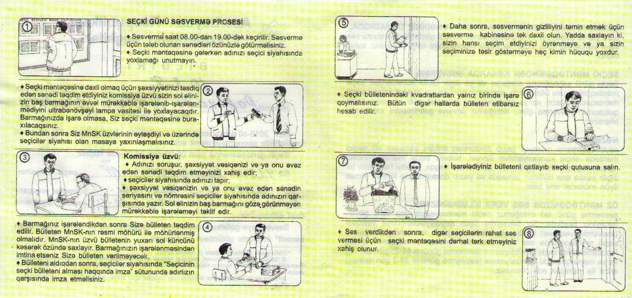 2013-cü il Azərbaycan Respublikası prezidenti seçkilərində paylanmış seçici bildirişi